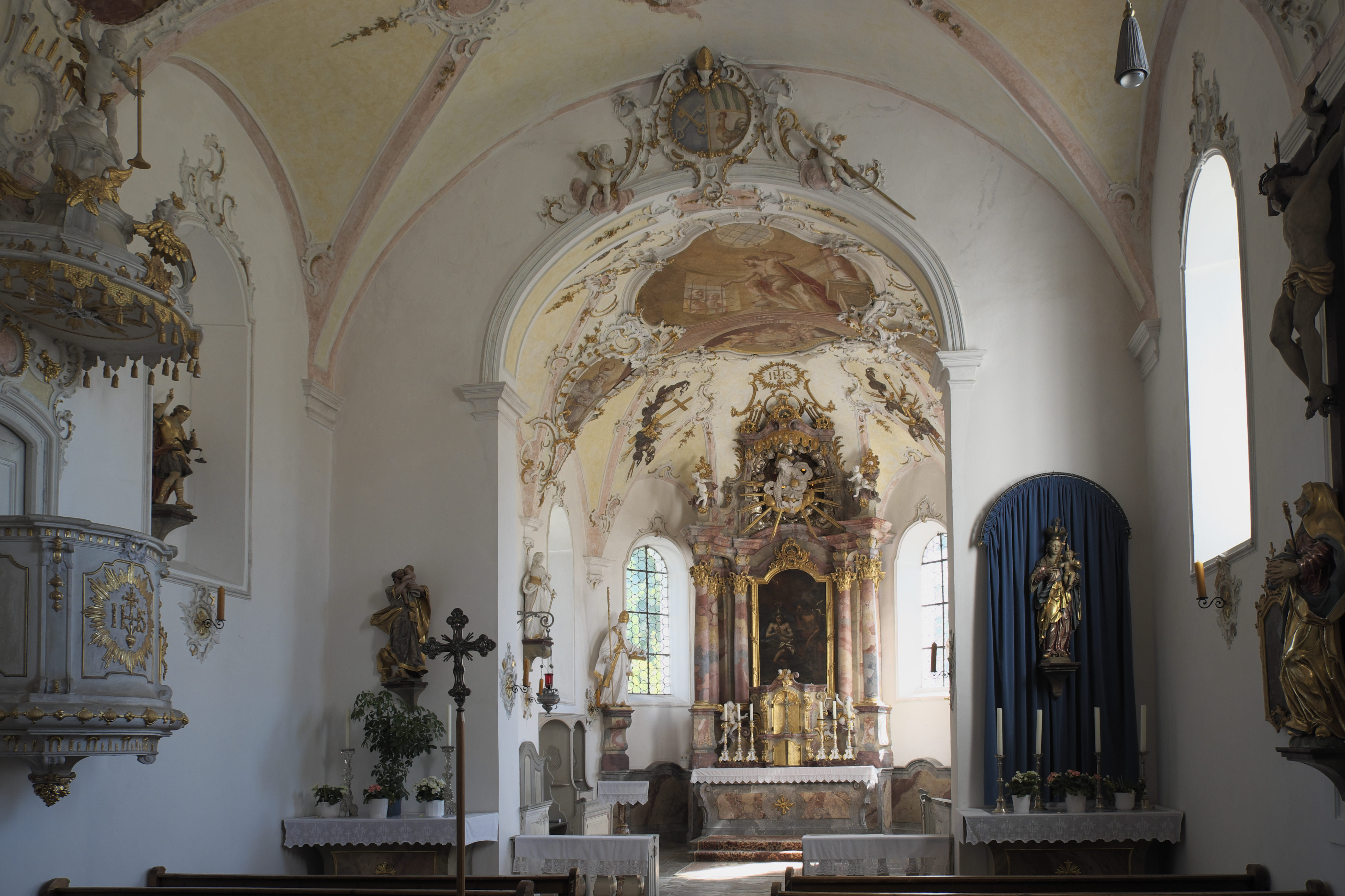 Katholische Pfarrkirche St. Johannes der Täufer in Rott im Landkreis Landsberg am Lech (Bayern/Deutschland), Innenraum